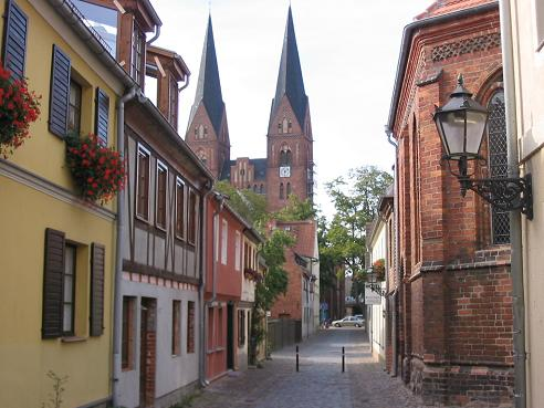 Siechenstraße, Neuruppin, Brandenburg - rechts Siechenhauskapelle St. Laurentius von 1491, Hintergrund Klosterkirche St. Trinitatis